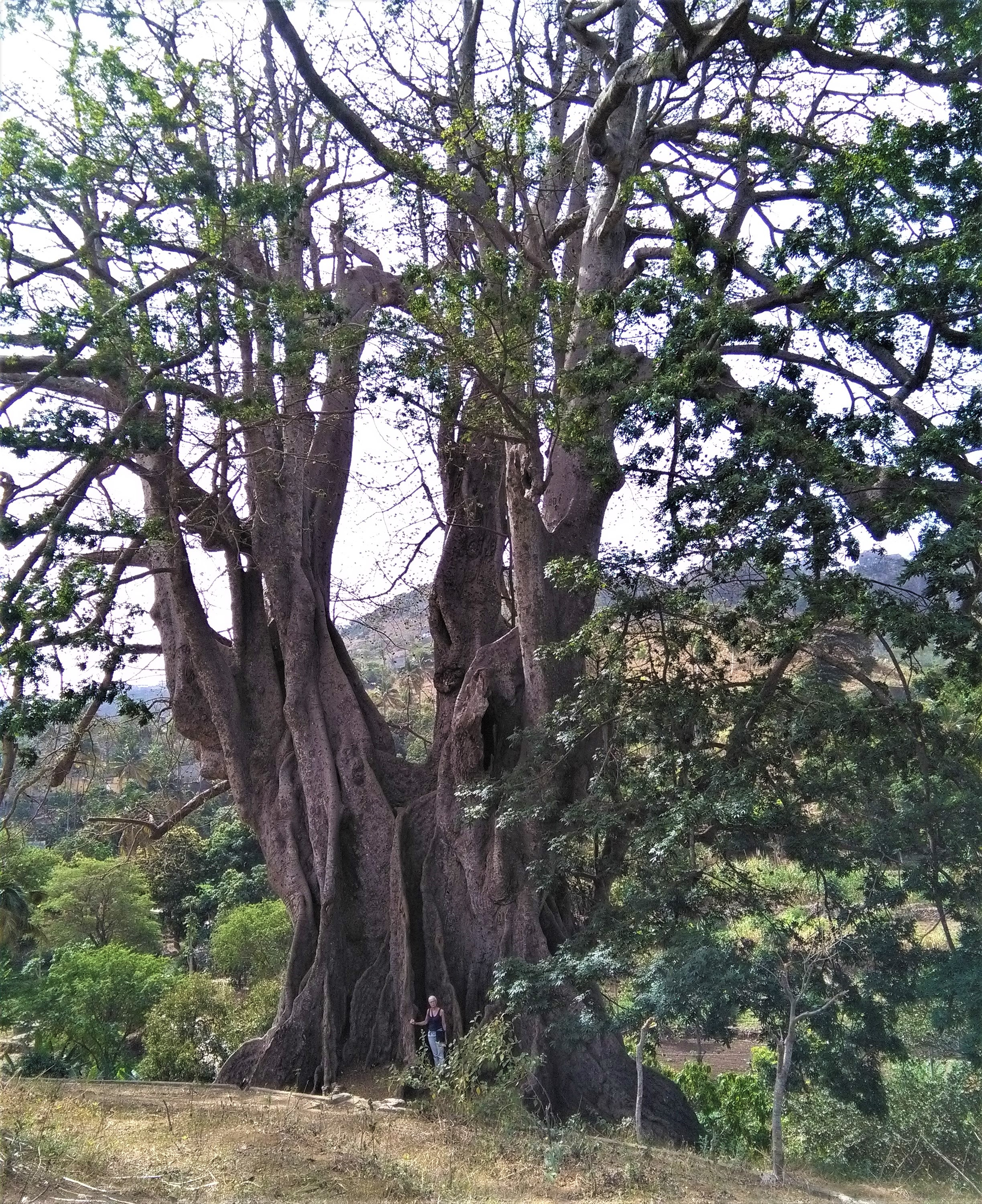 Januari 2018